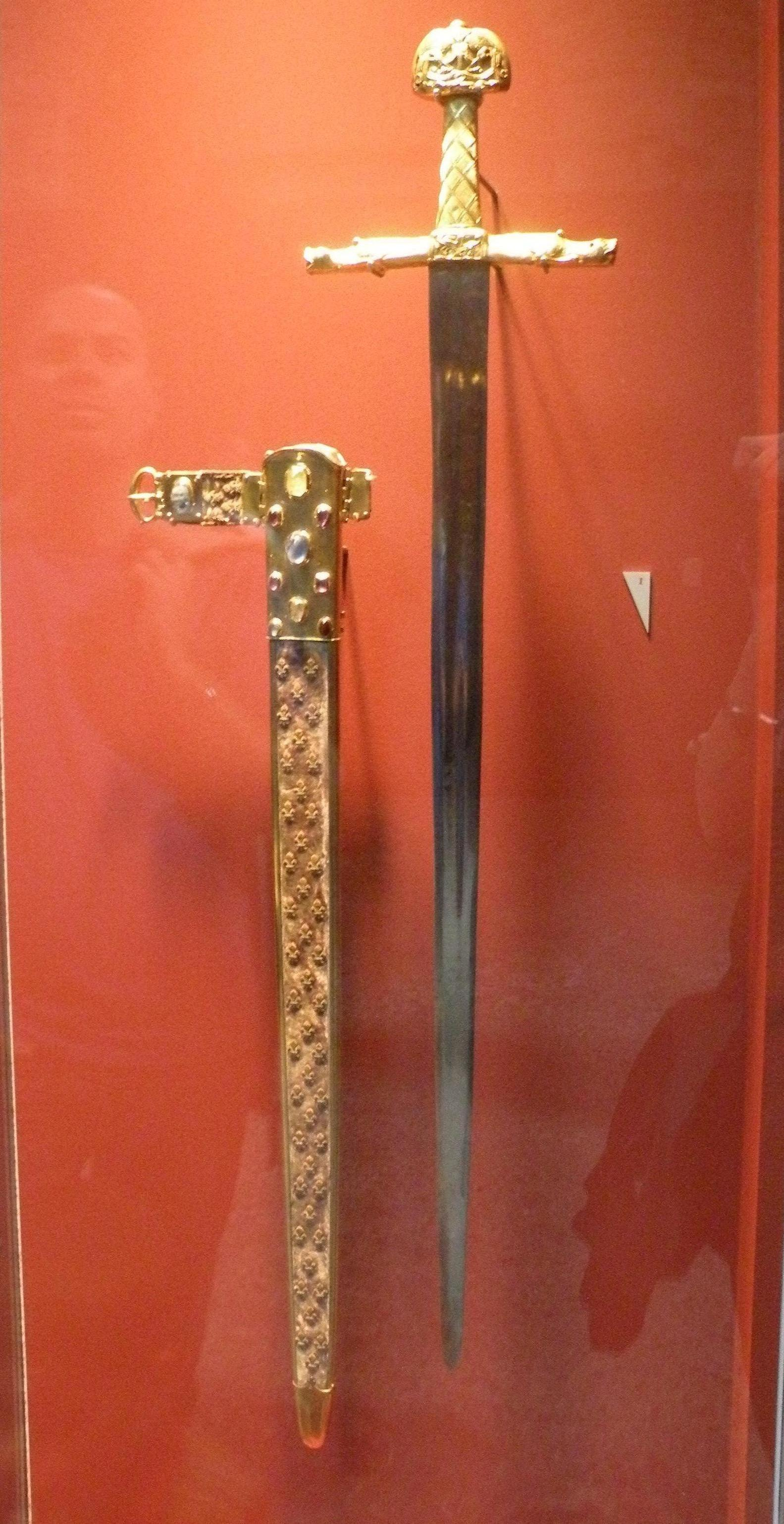 Épée de Charlemagne dite la Joyeuse utilisée pour les sacres des rois de France